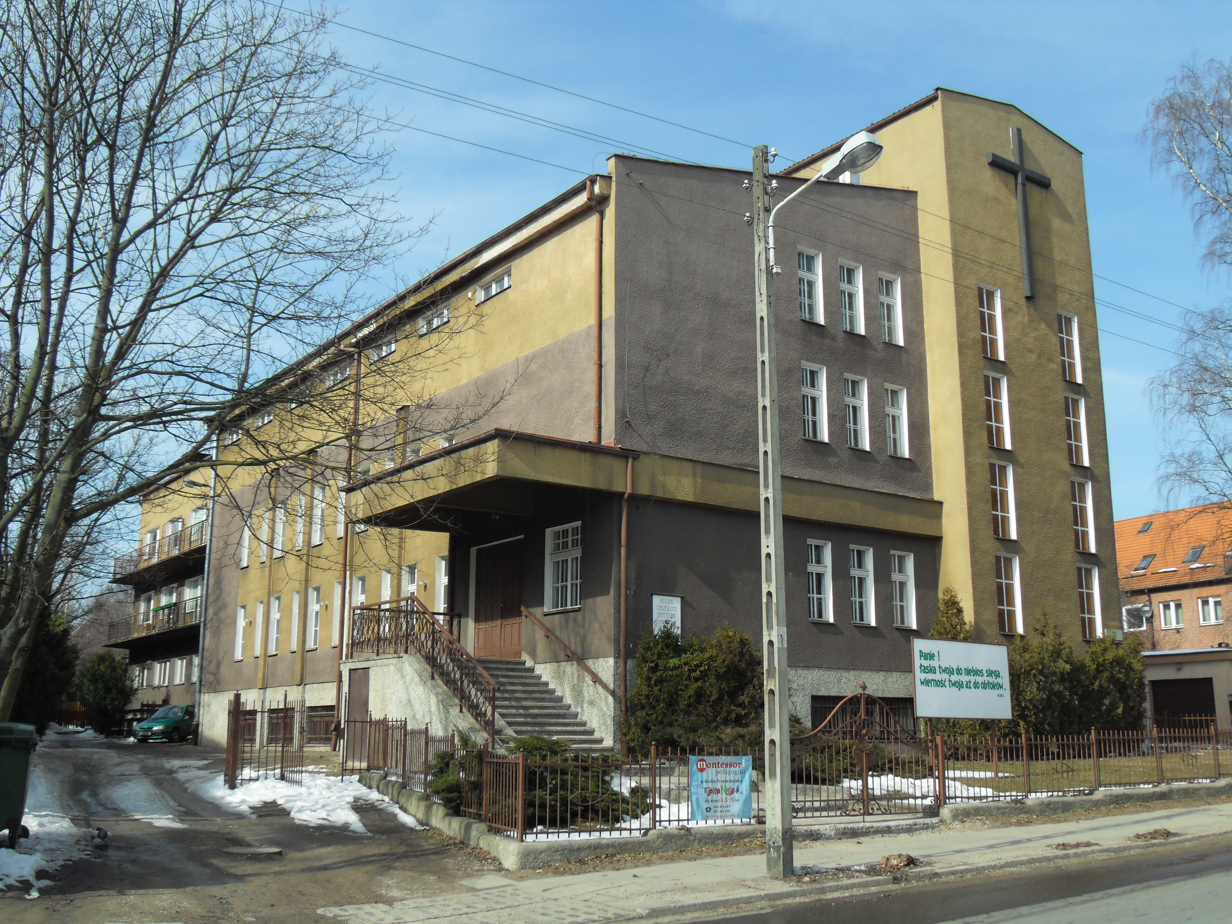 Gdańsk Aniołki, ul. Dąbrowskiego 11. Kościół Chrześcijan Baptystów, Pierwszy Zbór w Gdańsku.